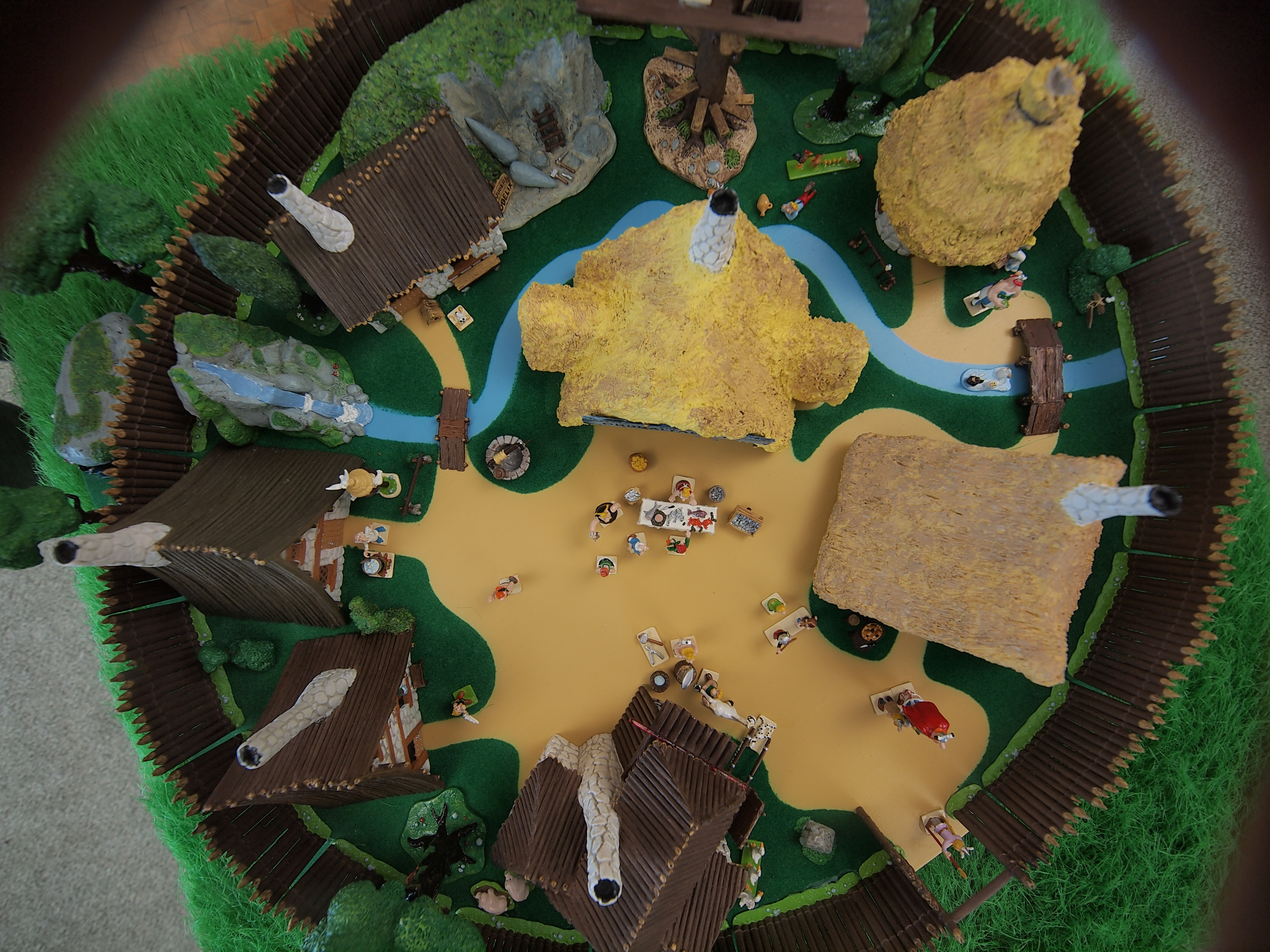 Luftaufnahme eines Gallisch-germanischen Dorfes, Modell einer fiktiven Siedlung im LWL-Römermuseums in Haltern am See.